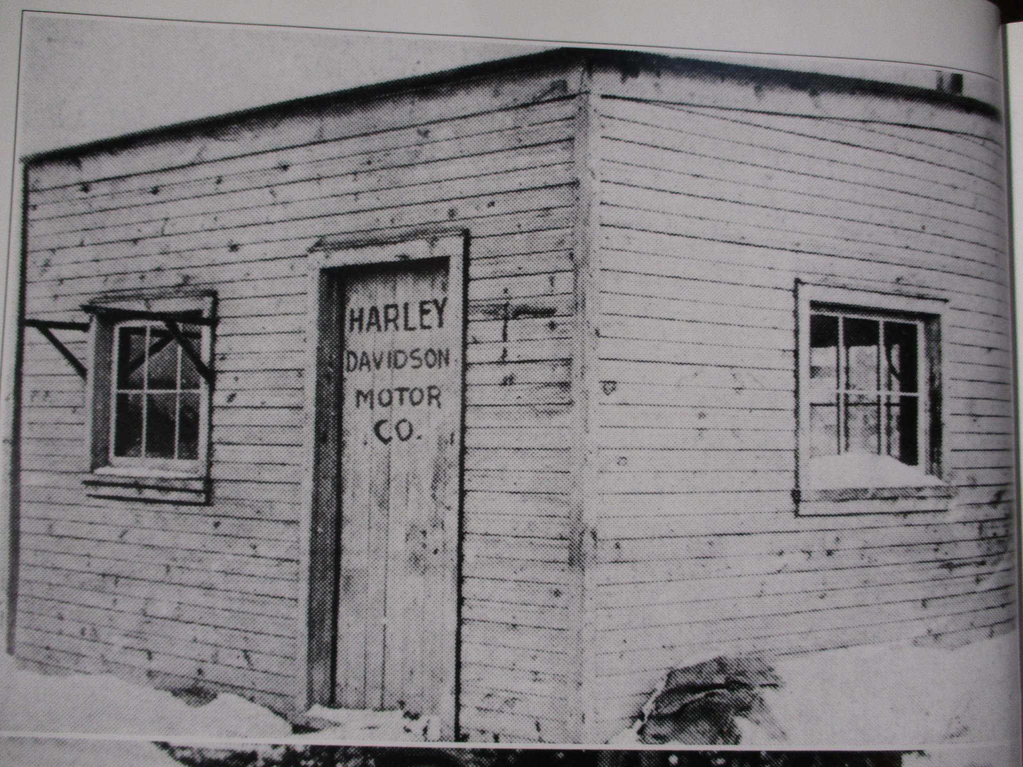 Cabane / usine Harley-Davidson Motor Co entre 1903 et 1906, du jardin de ma maison des Davidson à Milwaukee